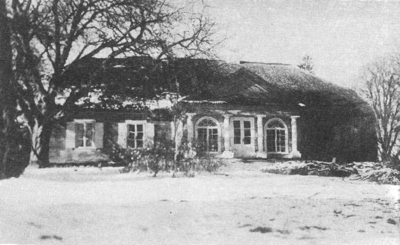 Džiuginėnų dvaras apie 1939 m.